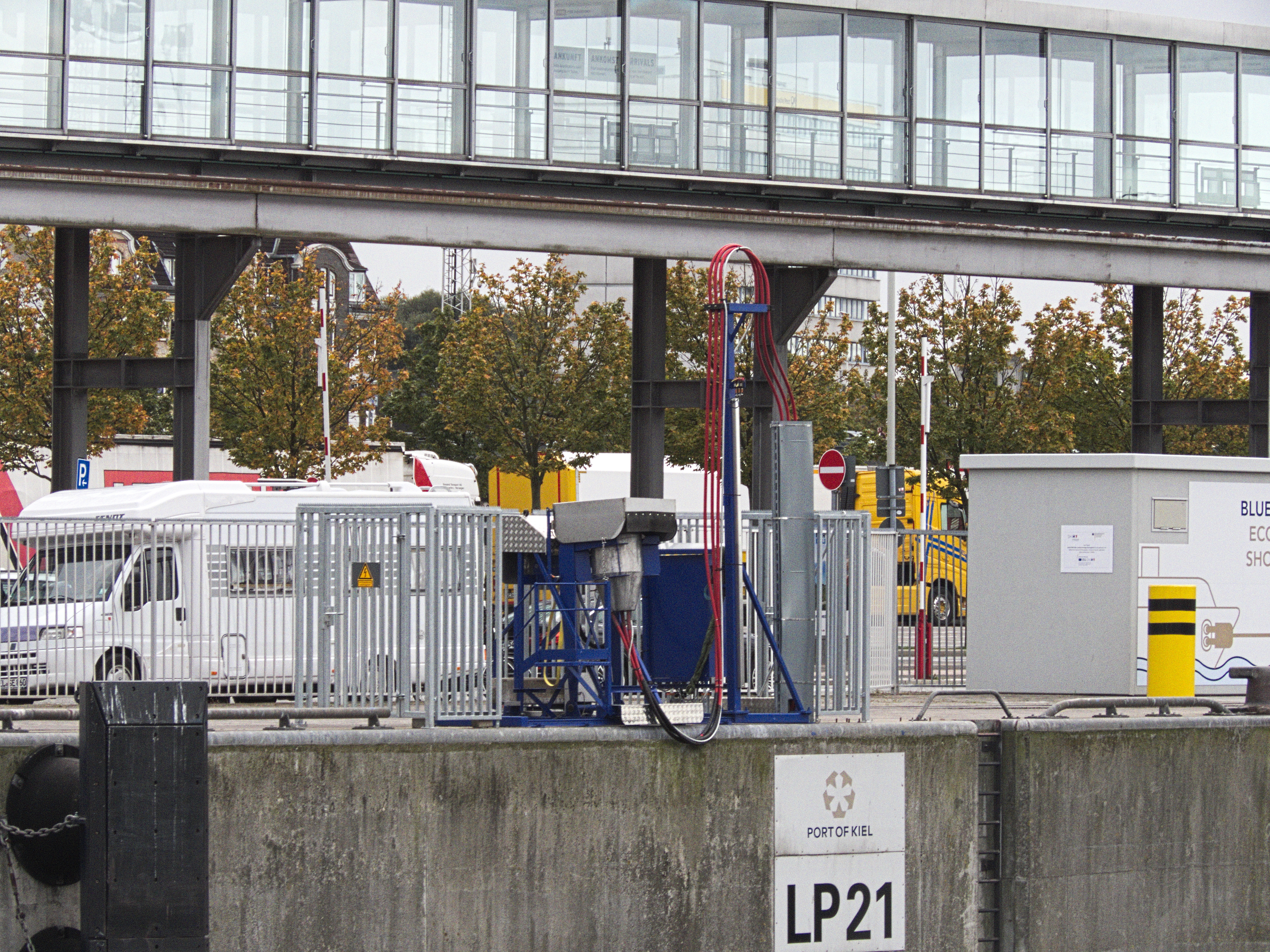 Landstromanlage am Norwegenkai des Port of Kiel